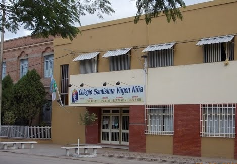 Escuela de Enseñanza Superior Orientada Particular Incorporada N° 8114 Santísima Virgen Niña. Villa Ocampo. Santa Fe.